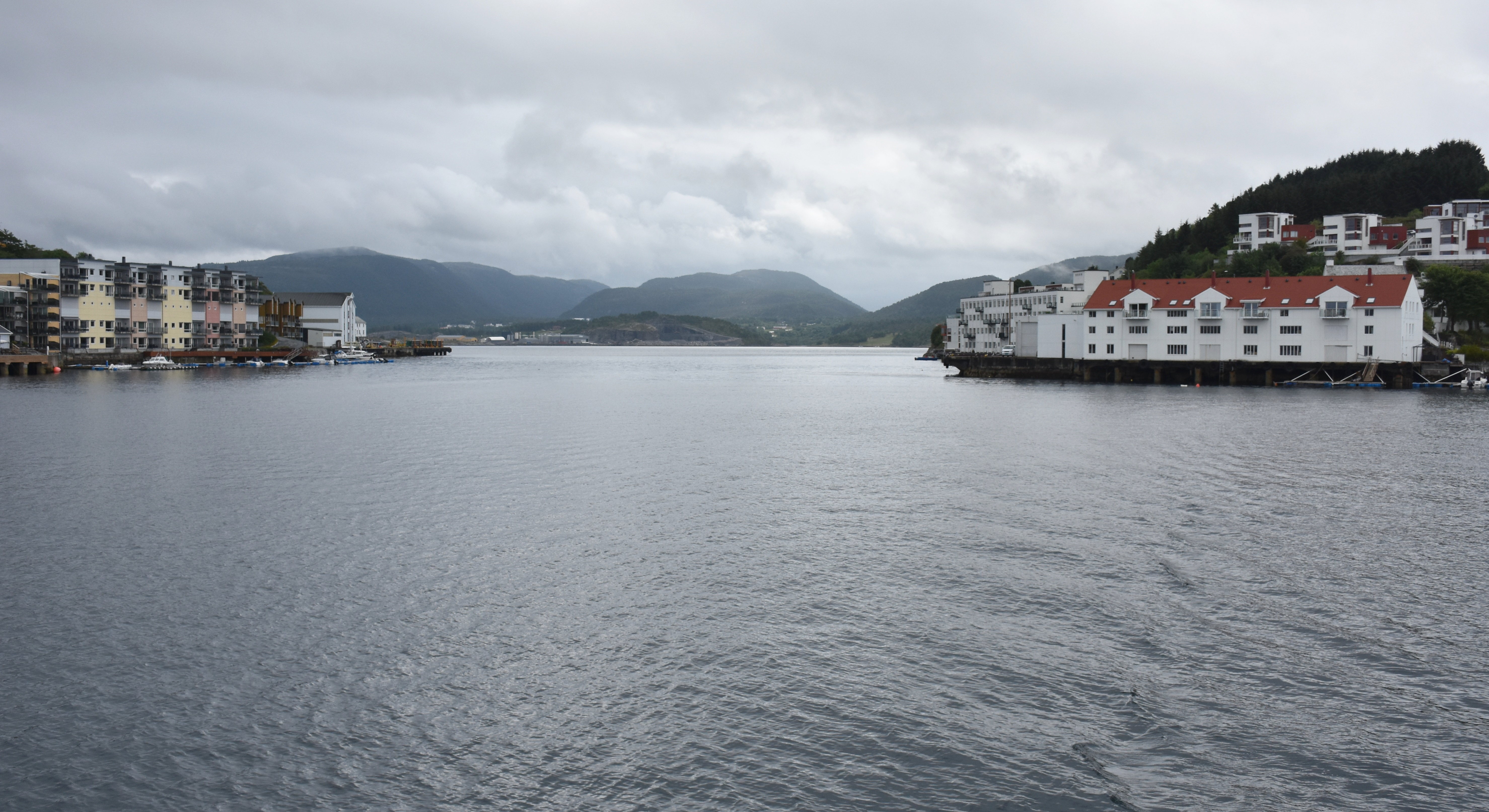 Markussundet mellom Innlandet og Nordlandet i Kristiansund